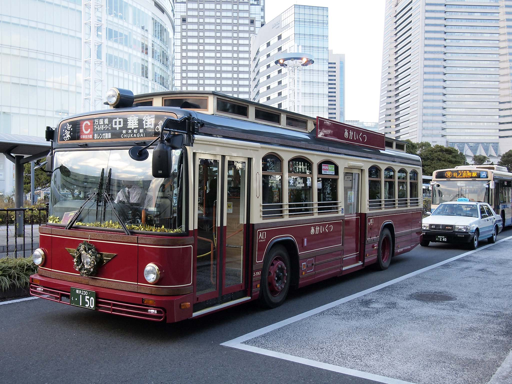 2012年に導入された横浜市交通局の観光スポット周遊バス「あかいくつ」7号車。ベース車はレインボーHRに代えてブルーリボンIIが選定されている。 型式：KV234L3改 施工：東京特殊車体 登録番号：横浜230く・150 撮影地：神奈川県横浜市中区、桜木町駅